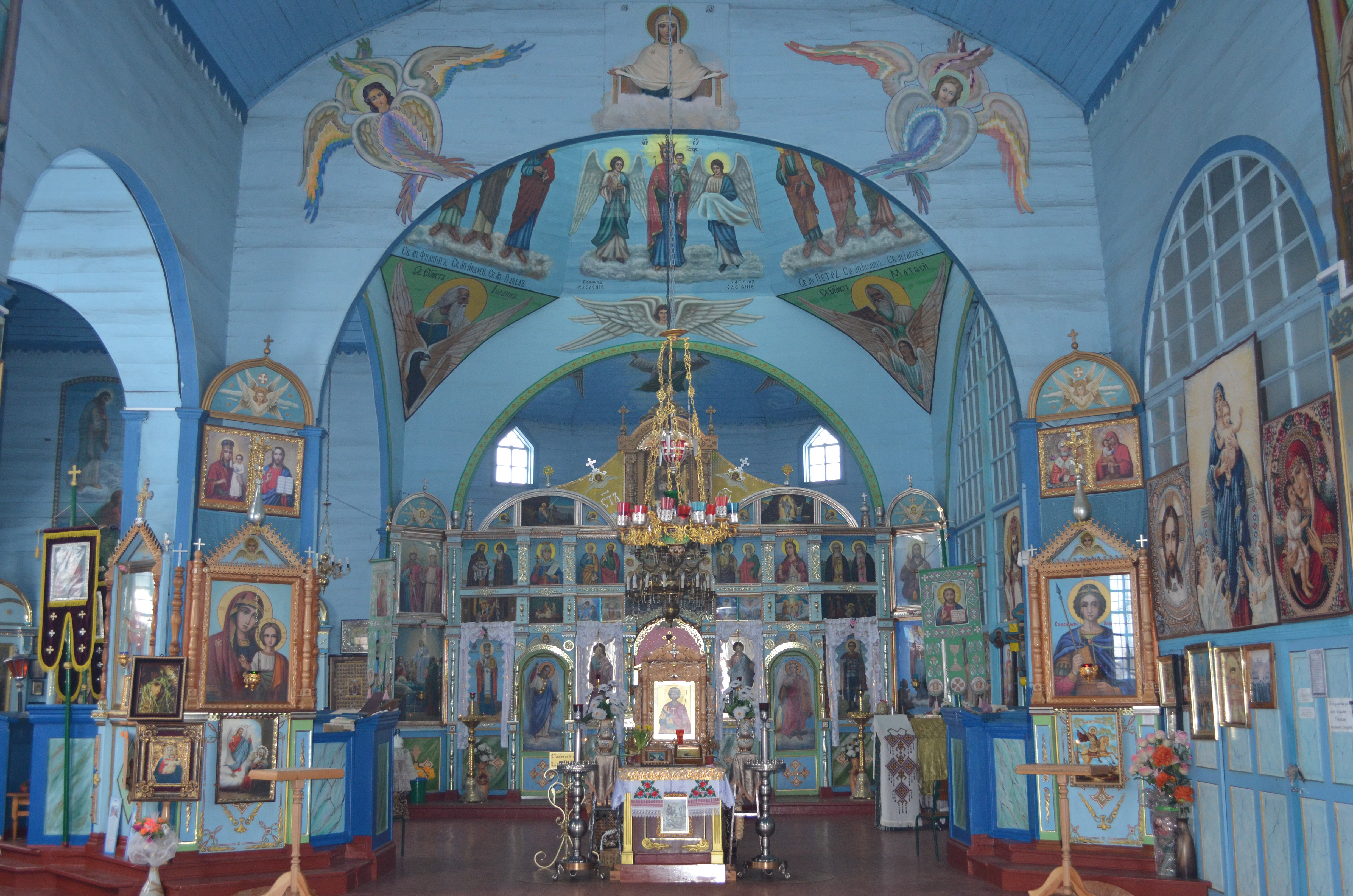 Георгіївська церква (дер.), село Селище. Один з кращих та величних дерев’яних храмів Лівобережної України